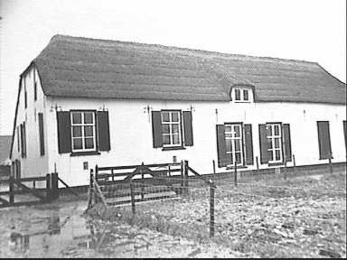 De Uithof: zij- en voorgevel (opmerking: Deze afbeelding hebben wij helaas alleen in deze lage resolutie.)